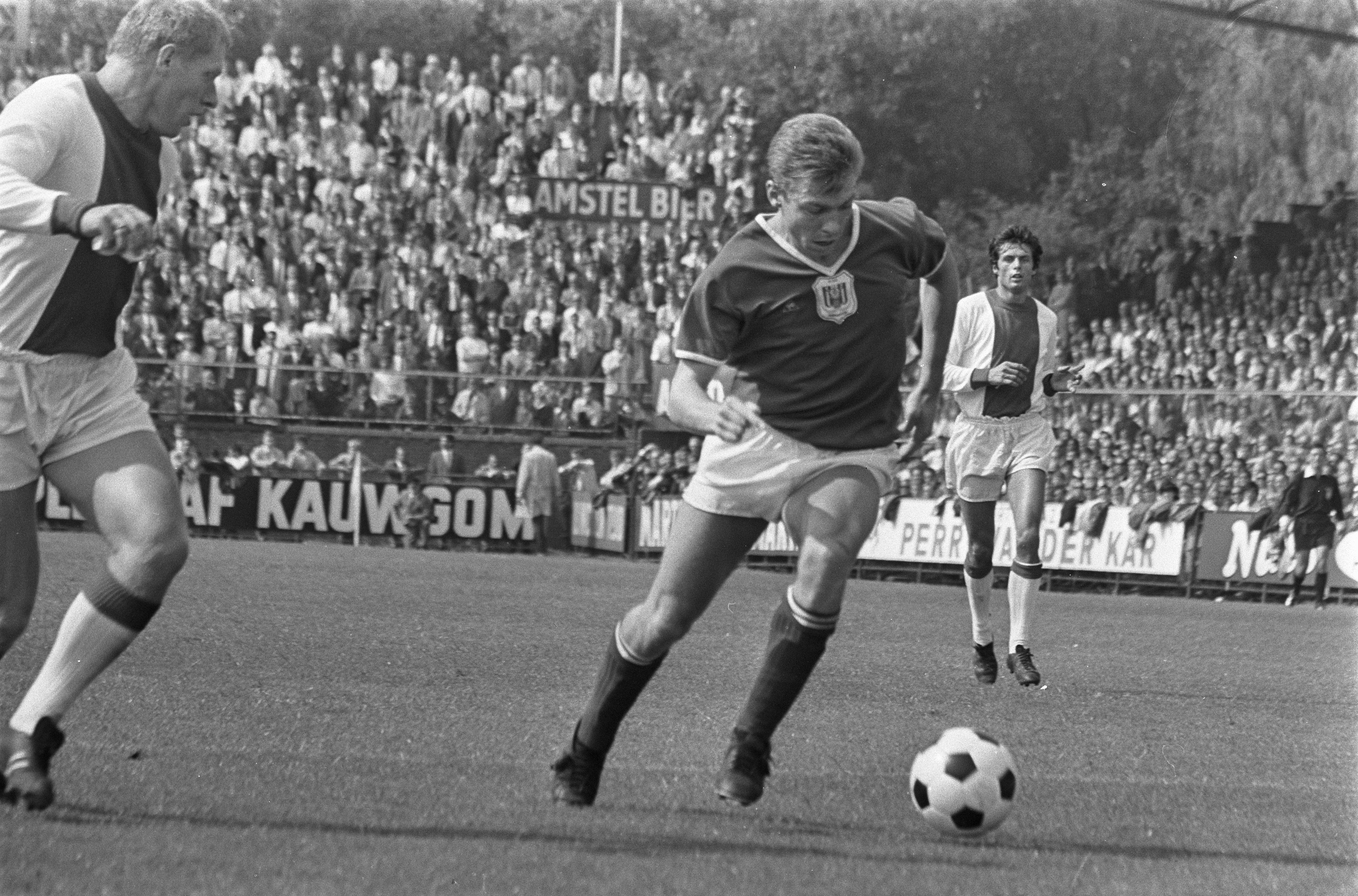 Collectie / Archief : Fotocollectie Anefo Reportage / Serie : [ onbekend ] Beschrijving : Ajax tegen Anderlecht. Jan Mulder aan de bal, hij wordt verdedigd door Tonnie Pronk, op de achtergrond Wim Suurbier Datum : 6 augustus 1967 Locatie : Amsterdam Trefwoorden : sport, voetbal Persoonsnaam : Mulder, Jan, Pronk, Tonnie, Pronk, Tonny, Suurbier, Wim Instellingsnaam : AJAX Fotograaf : Kroon, Ron / Anefo Auteursrechthebbende : Nationaal Archief Materiaalsoort : Negatief (zwart/wit) Nummer archiefinventaris : bekijk toegang 2.24.01.05 Bestanddeelnummer : 920-5739